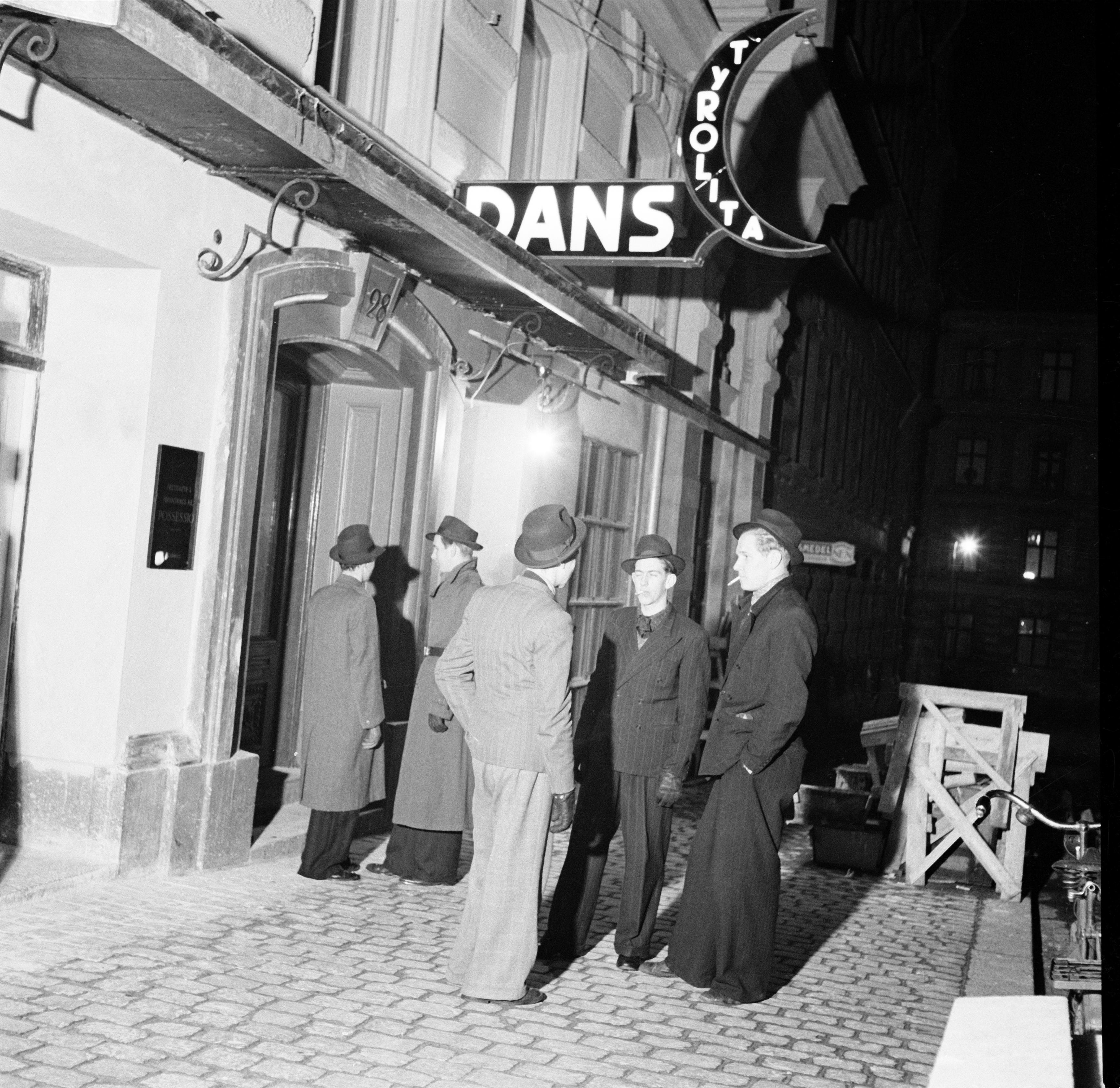 Swingpjattar står utanför dansrestaurang Tyrolita, Stockholm. Ämnesord: Dans, Mode, Restaurangverksamhet, Stad, Ungdom.